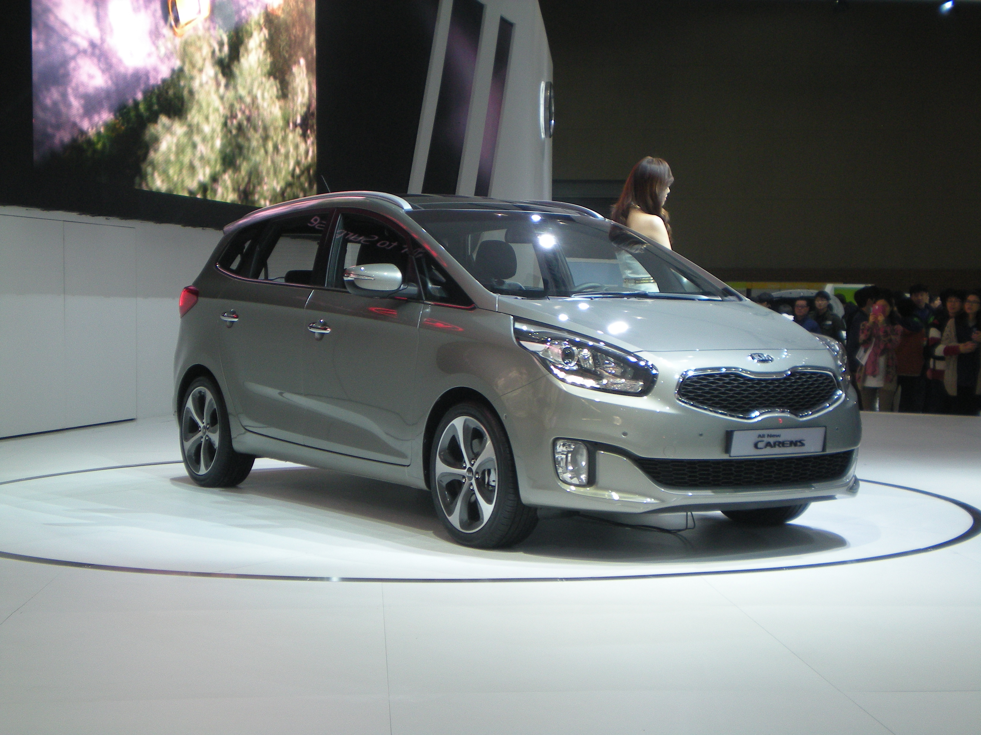 キア・カレンス